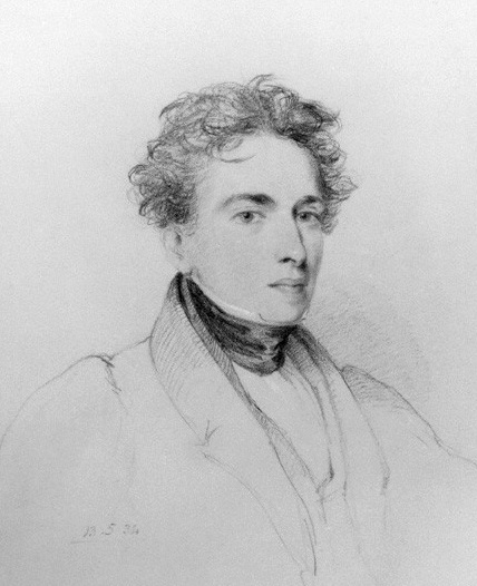 John Lander (* 1807; † 6. November 1839), englischer Afrikaforscher.